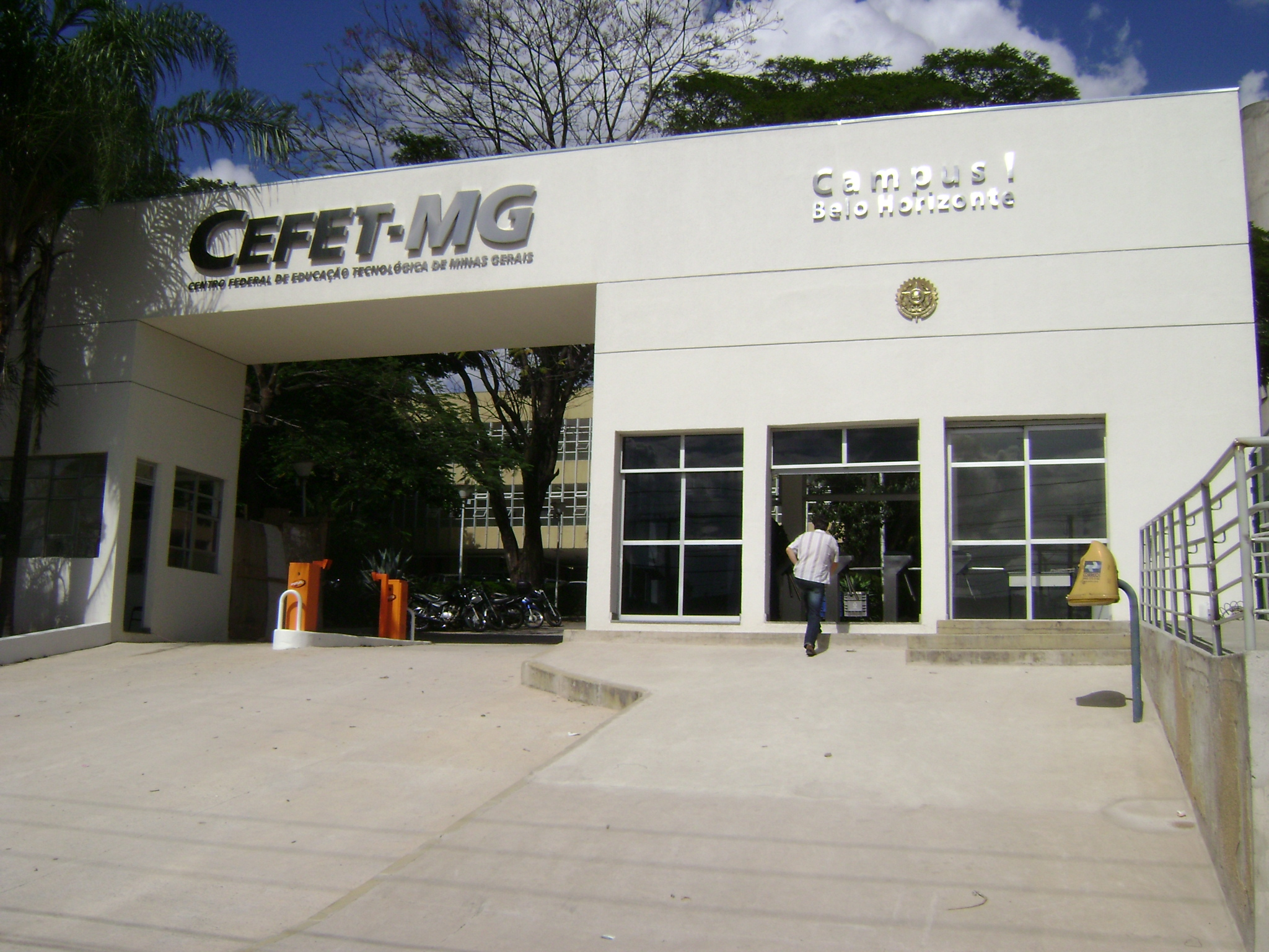 Entrada do campus I do Centro Federal de Educação Tecnológica de Minas Gerais, em Belo Horizonte, Brasil.